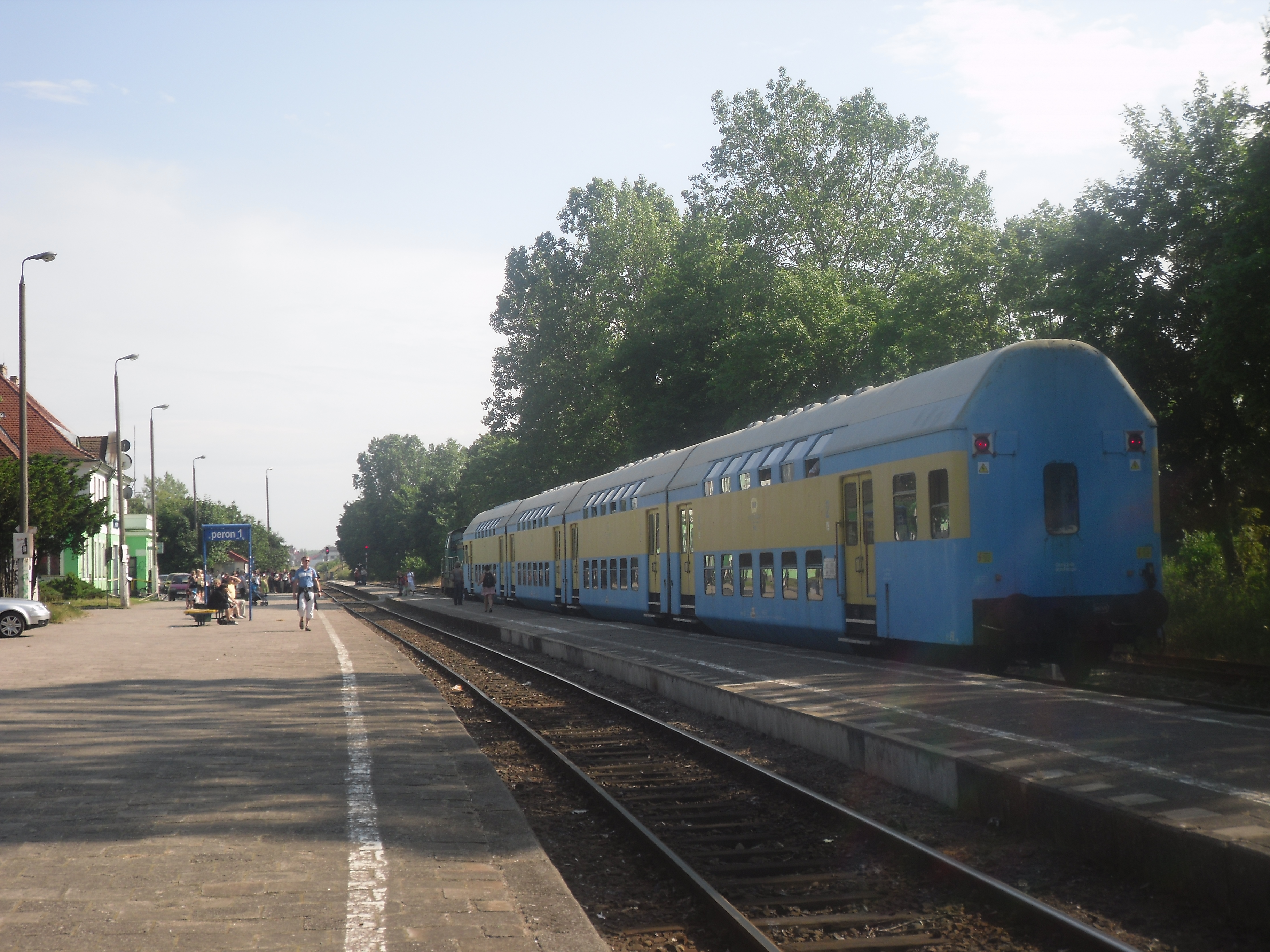 Pociąg relacji Hel-Gdynia Głowna na stacji Władysławowo